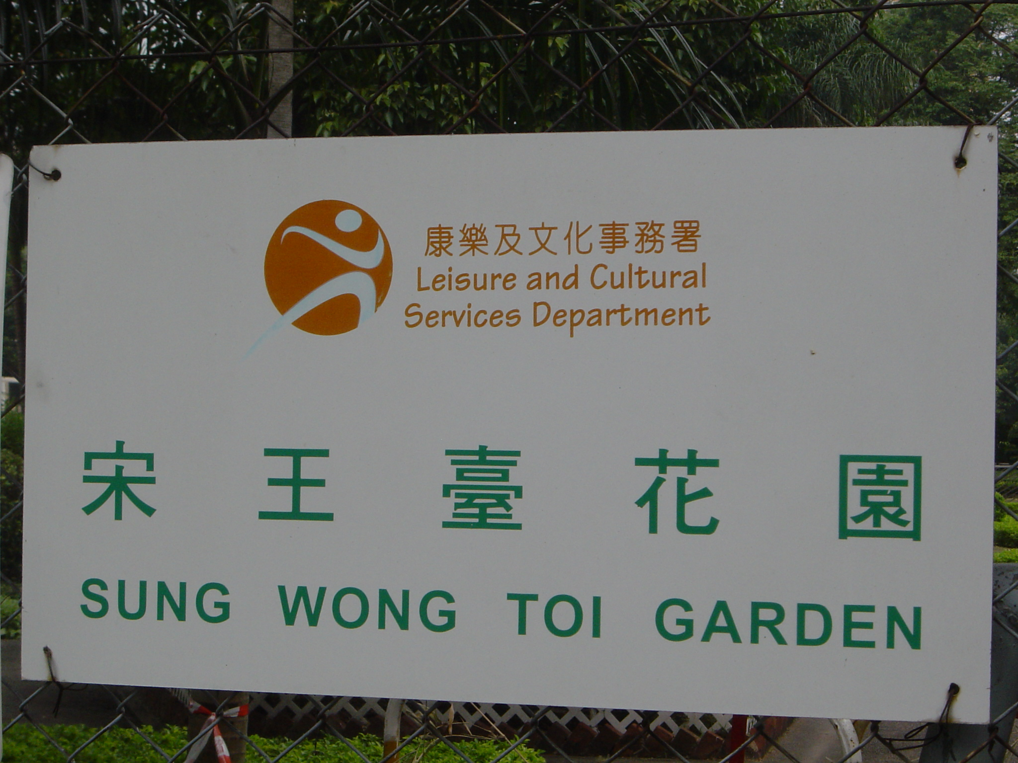 香港宋王臺花園的標牌。Sung Wong Toi, Hong Kong.